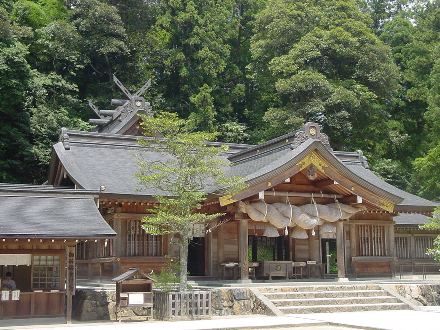 Kumano Shrine in Matsue - Sanctuaire Kumano - 松江市の熊野大社 3